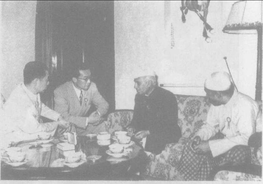 中文（中国大陆）: 1955年4月周恩来、尼赫鲁与吴努在万隆会议期间交谈